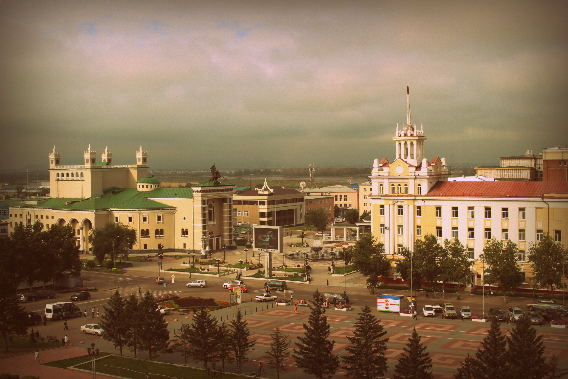 Площадь Советов - центральная площадь Улан-Удэ. Бурятия, Сибирь